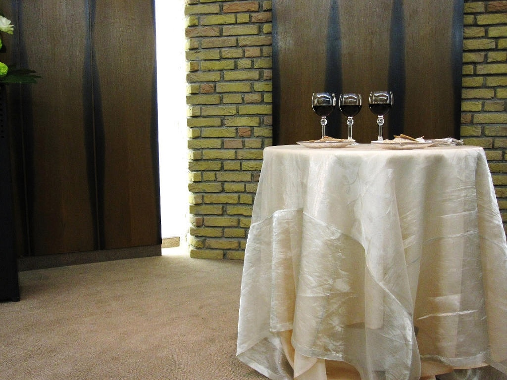 Abendmahl (Jehovas Zeugen)